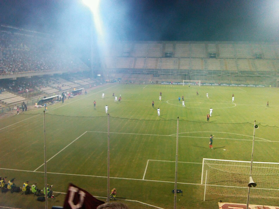 Salernitana-Lecce 2-1 Lega Pro 1a div. 2013-2014